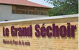 Entrée du Grand Séchoir, le Musée de la Noix. Espace muséographique autour de la culture de la Noix de Grenoble, basé à Vinay, Capitale de la noix de Grenoble, le Grand Séchoir permet de découvrir tout l'environnement lié à cette culture indissociable du terroir de Vinay et qui façonne également l'architecture et le paysage.